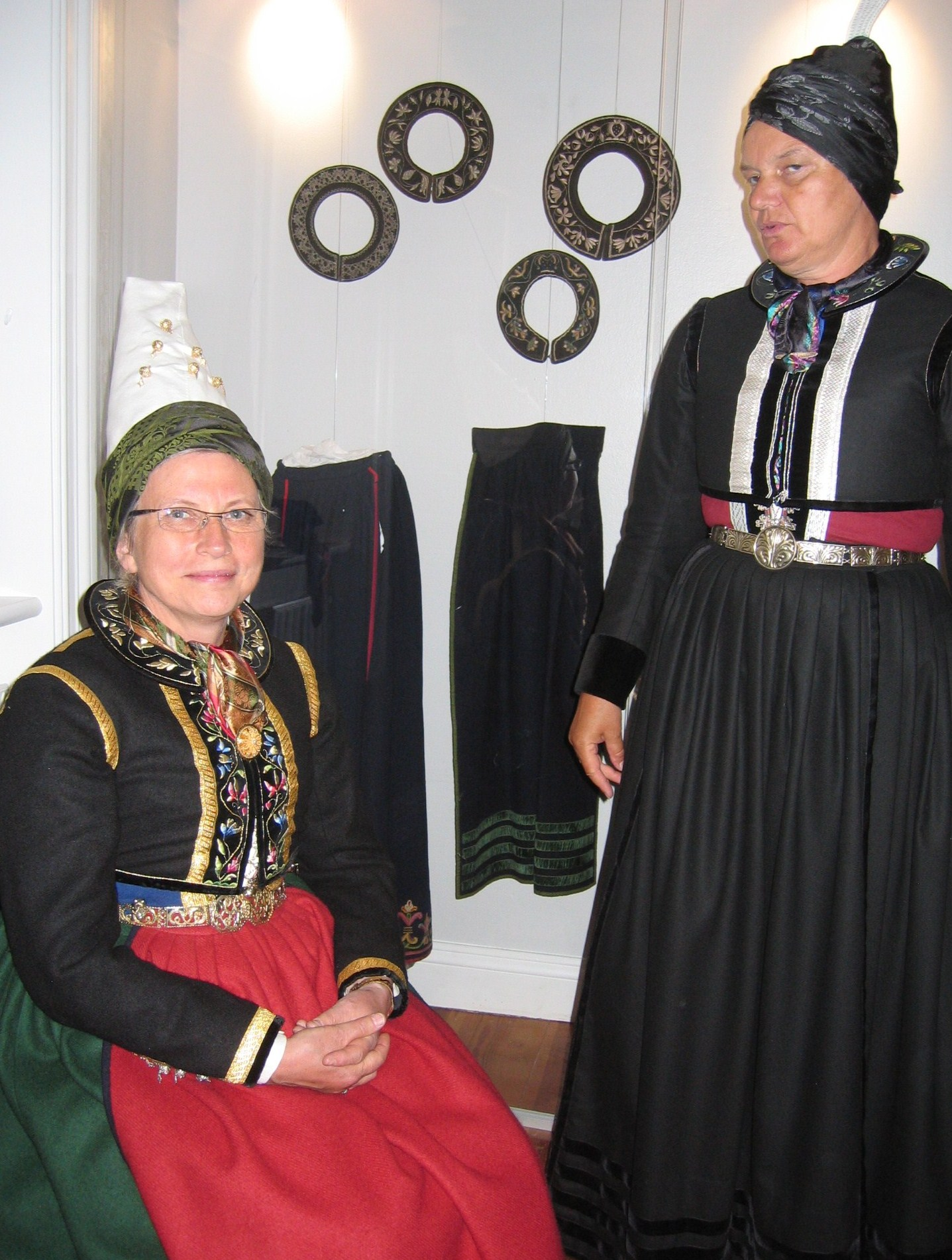 Félagskonur úr Faldafeyki sýna íslenska faldbúninginn á safnadegi í Árbæjarsafni í júlí 2008.